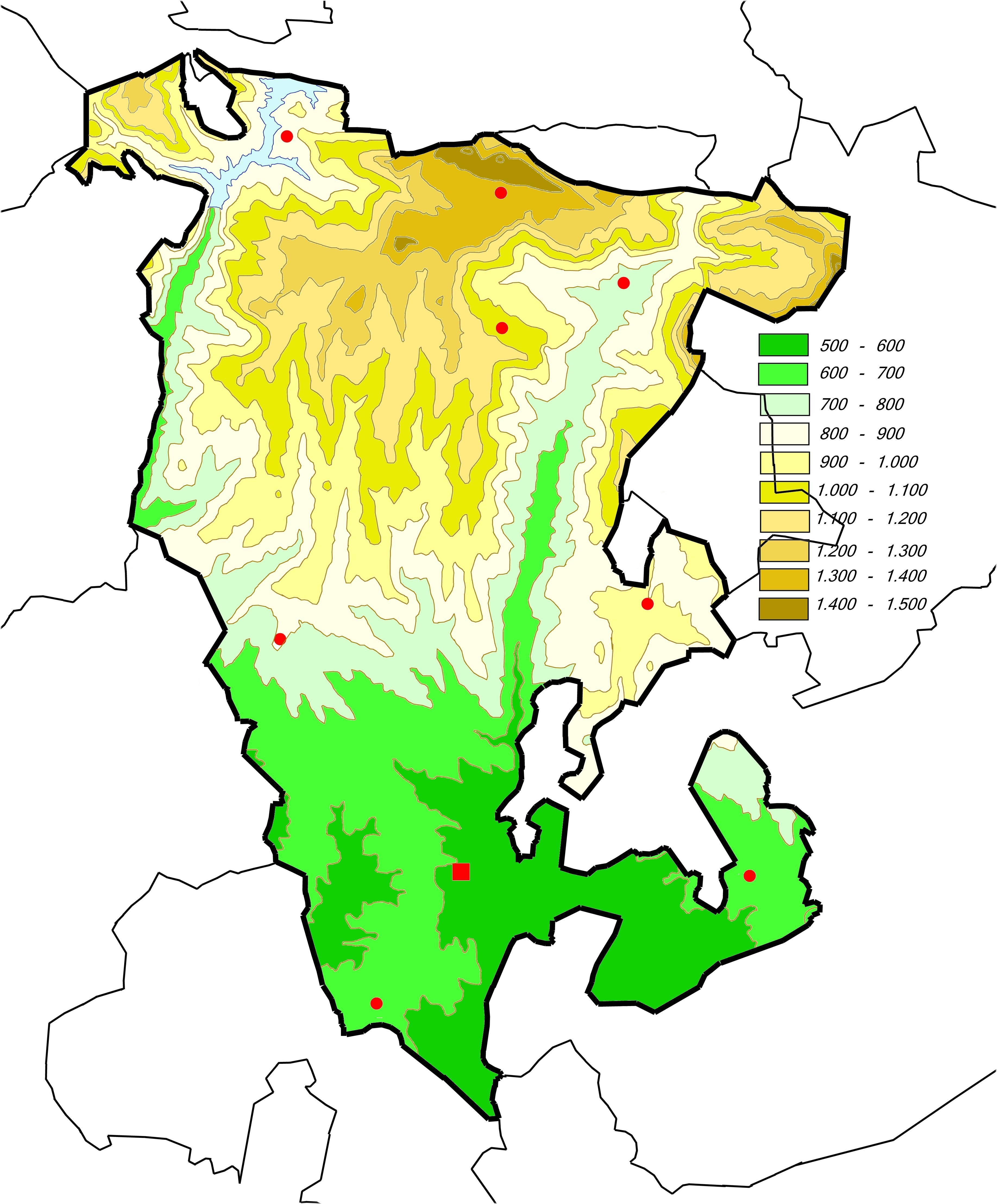 Mapa orogràfic del municipi de Navès (Solsonès)